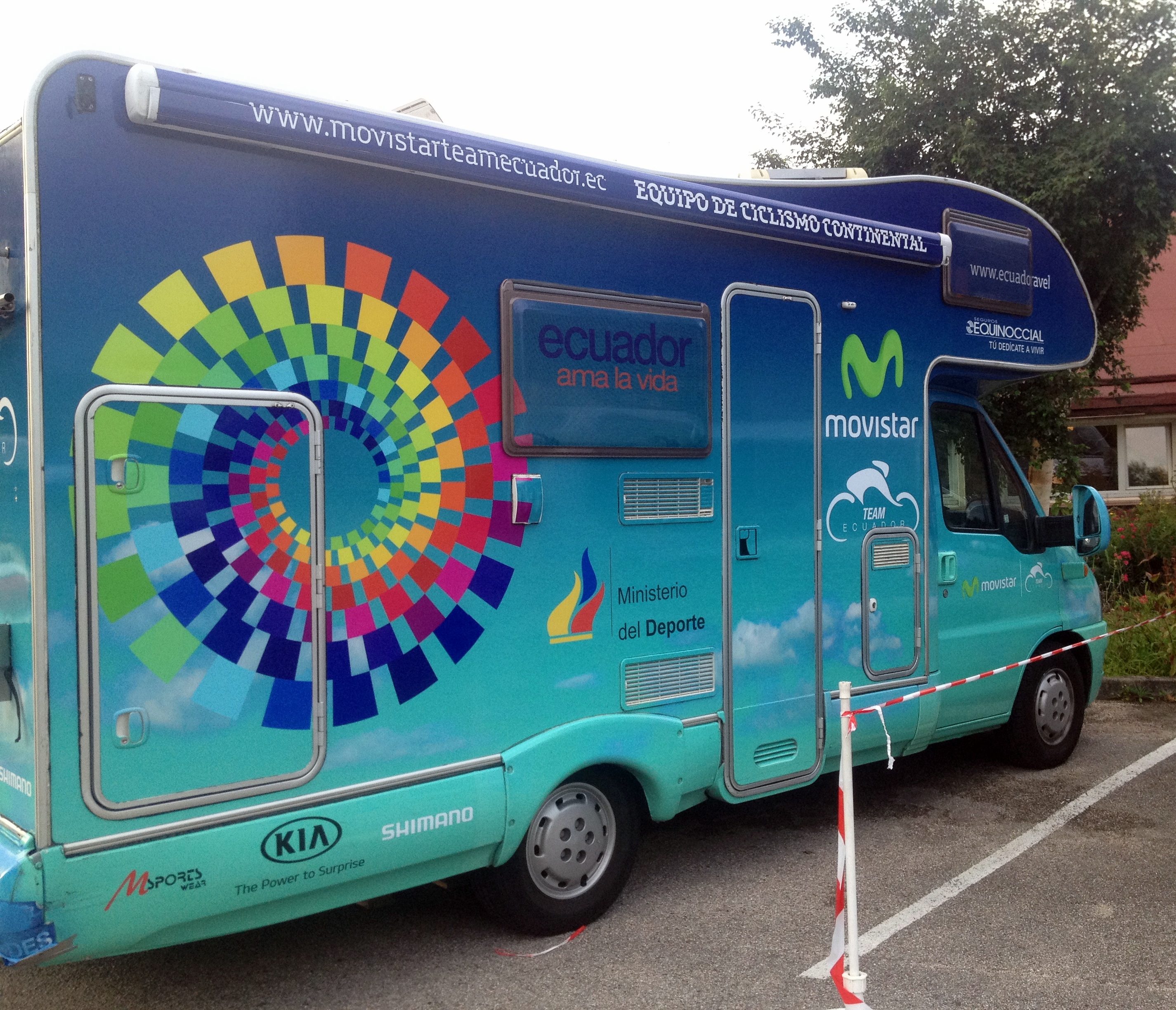 L'équipe cycliste Ecuador à l'issue du prologue du Tour de l'Ain 2014.